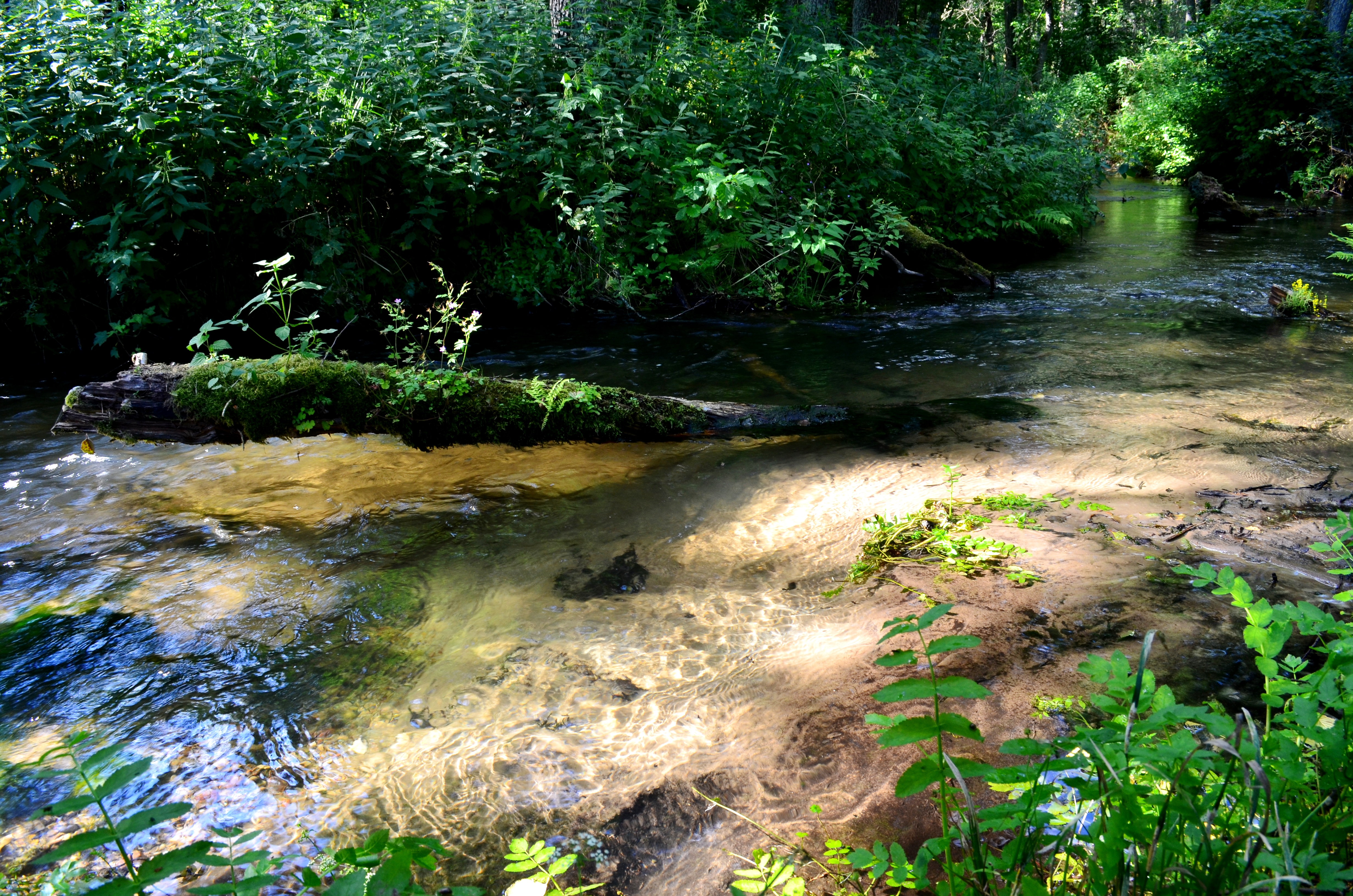 Skroblus Rudnelėje, Varėnos r.